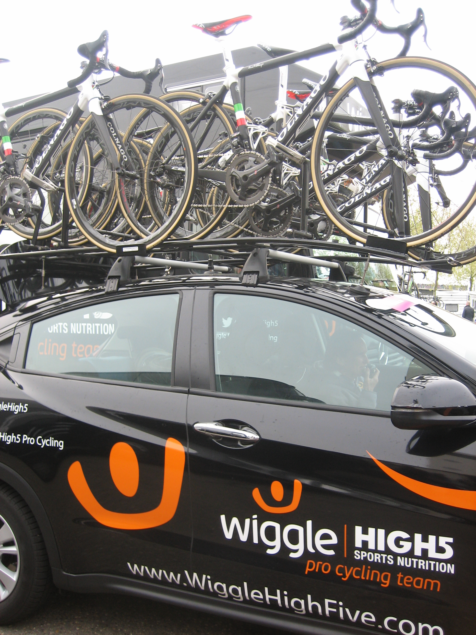 Start van de Amstel Gold Race Ladies Edition 2017 in Maastricht.